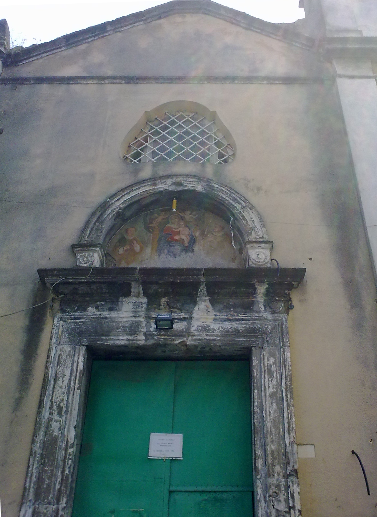 Cappella di San Nicola, via Michele Pironti, Nocera Inferiore. Particolare del portale.